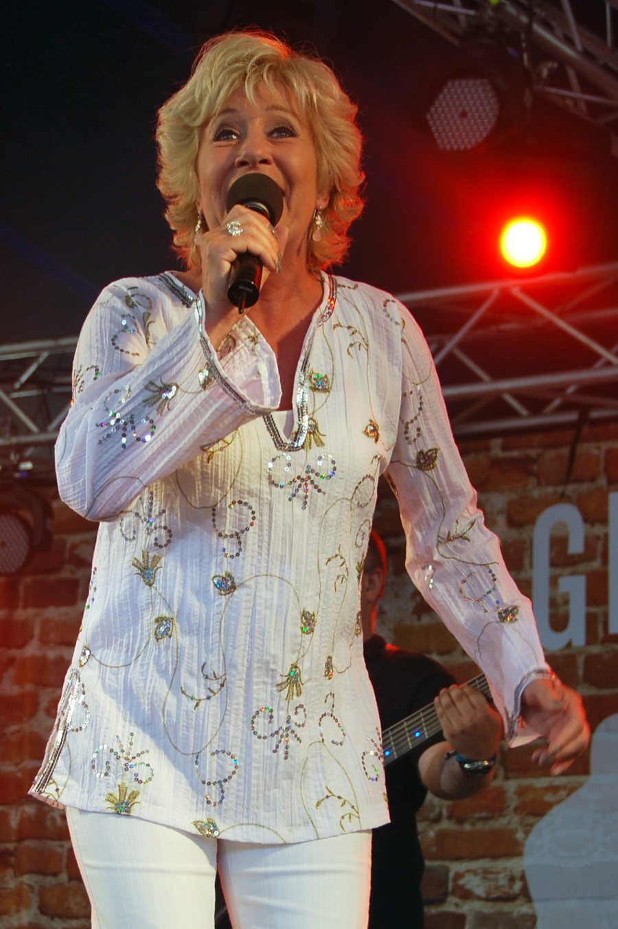 Birthe Kjær under sin koncert på Vig Festival 2010.